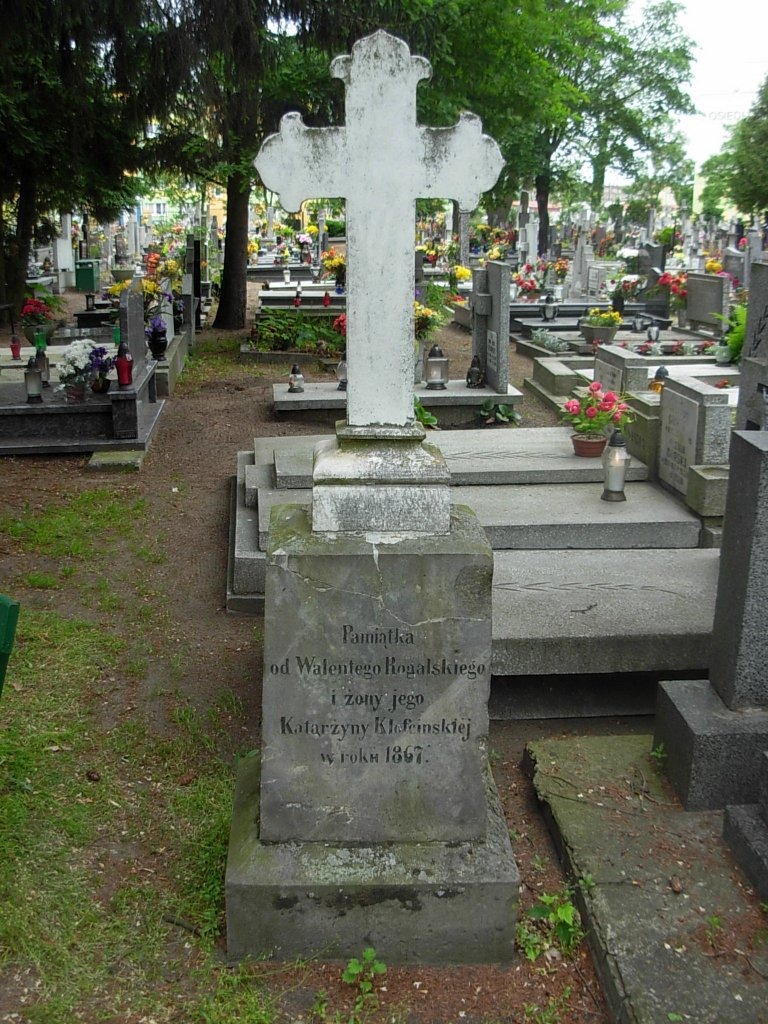 Cmentarz św. Mikołaja Bydgoszcz - stary nagrobek